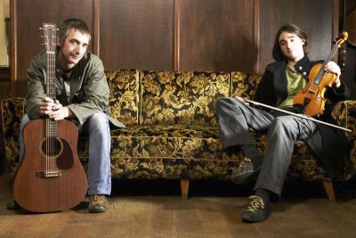 Broom Bezzums 2008